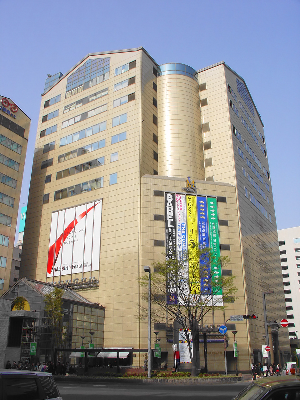 Tenjin MM Building.(Chuo Ward, Fukuoka City, Fukuoka Prefecture, Japan)